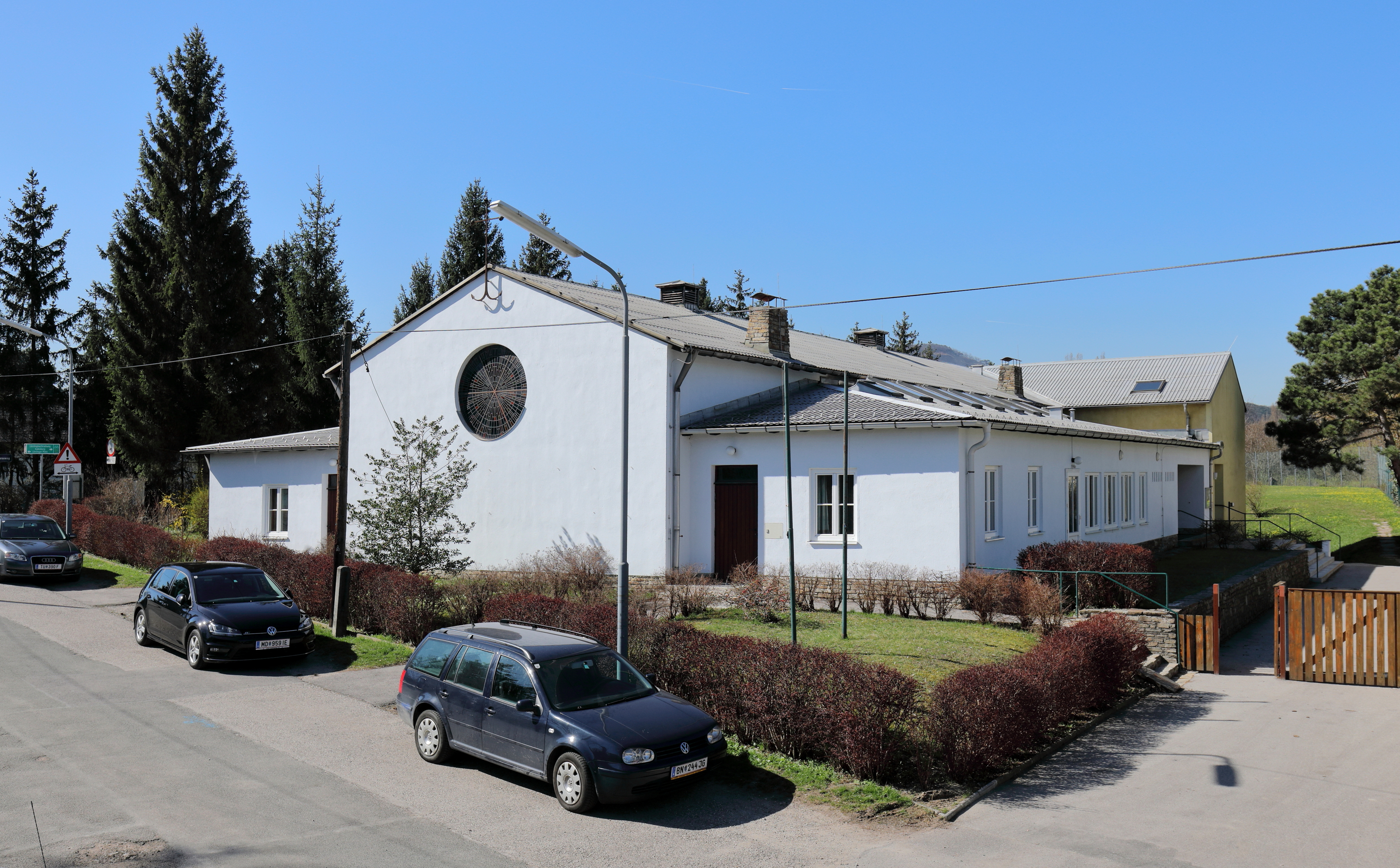 Nordostansicht der röm.-kath. Pfarrkirche Maria Himmelfahrt in Rodaun, ein Bezirksteil des 23. Wiener Bezirkes Liesing. Der rechteckige Bau mit Nebengebäuden in der Schreckgasse wurde nach Plänen des Architekten Hans Petermair errichtet und am 10. Oktober 1954 geweiht.